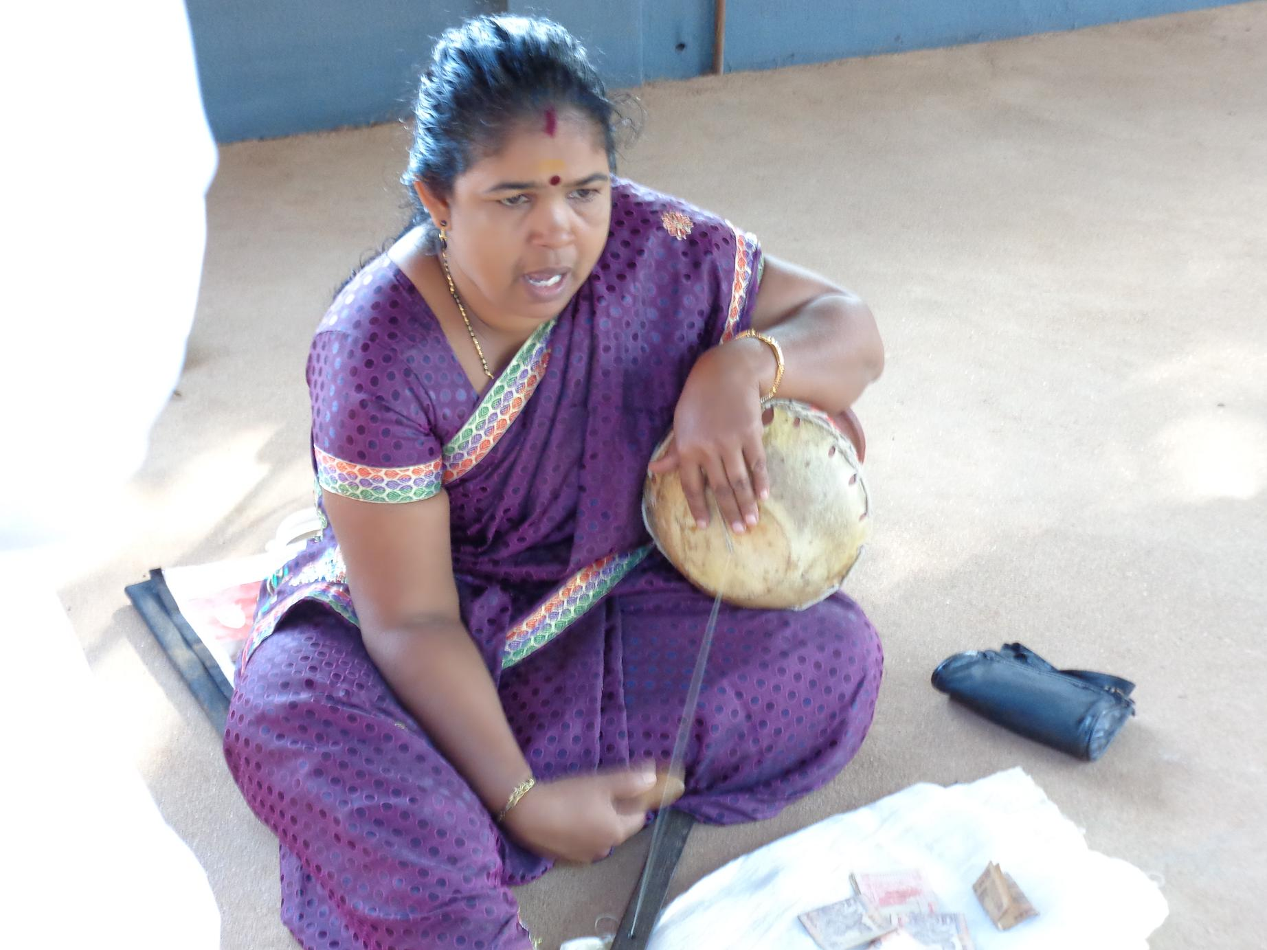 pulluva lady with pulluvakkudam, from vettickot temple